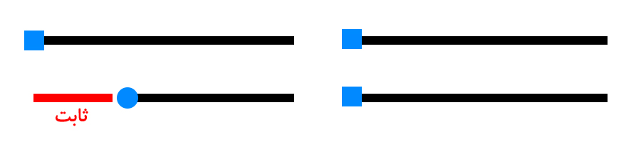 توضیح قالب میخانا